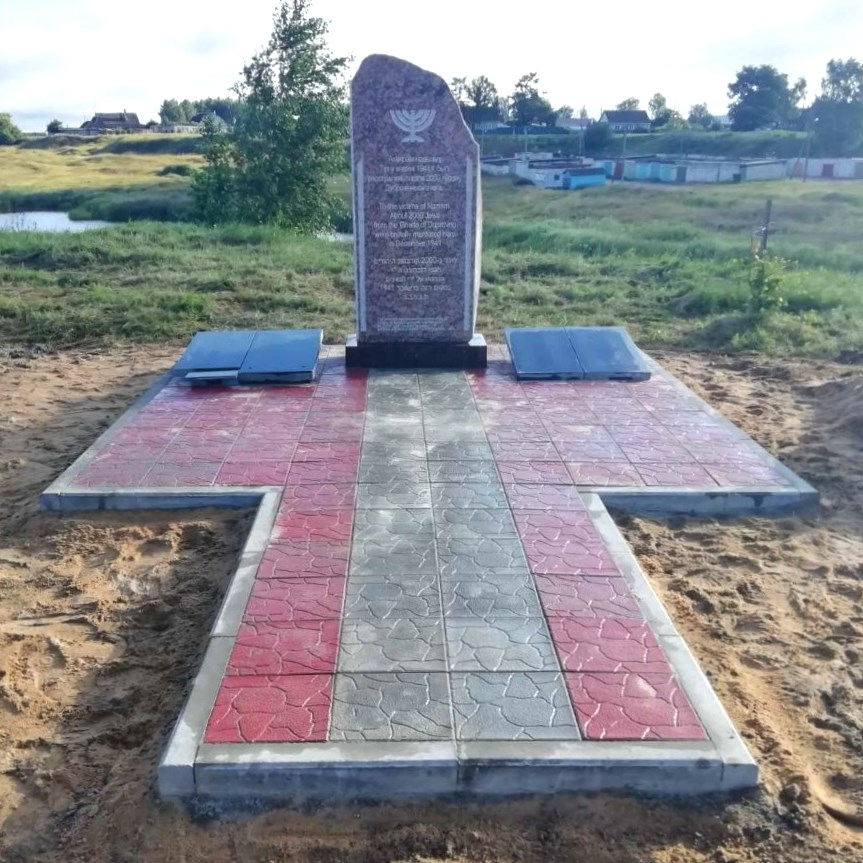 Новый памятник евреям - узникам гетто в городе Дубровно Витебской области, убитым нацистами 6 декабря 1941 года. Установлен вместо старого памятника в июле 2020 года.